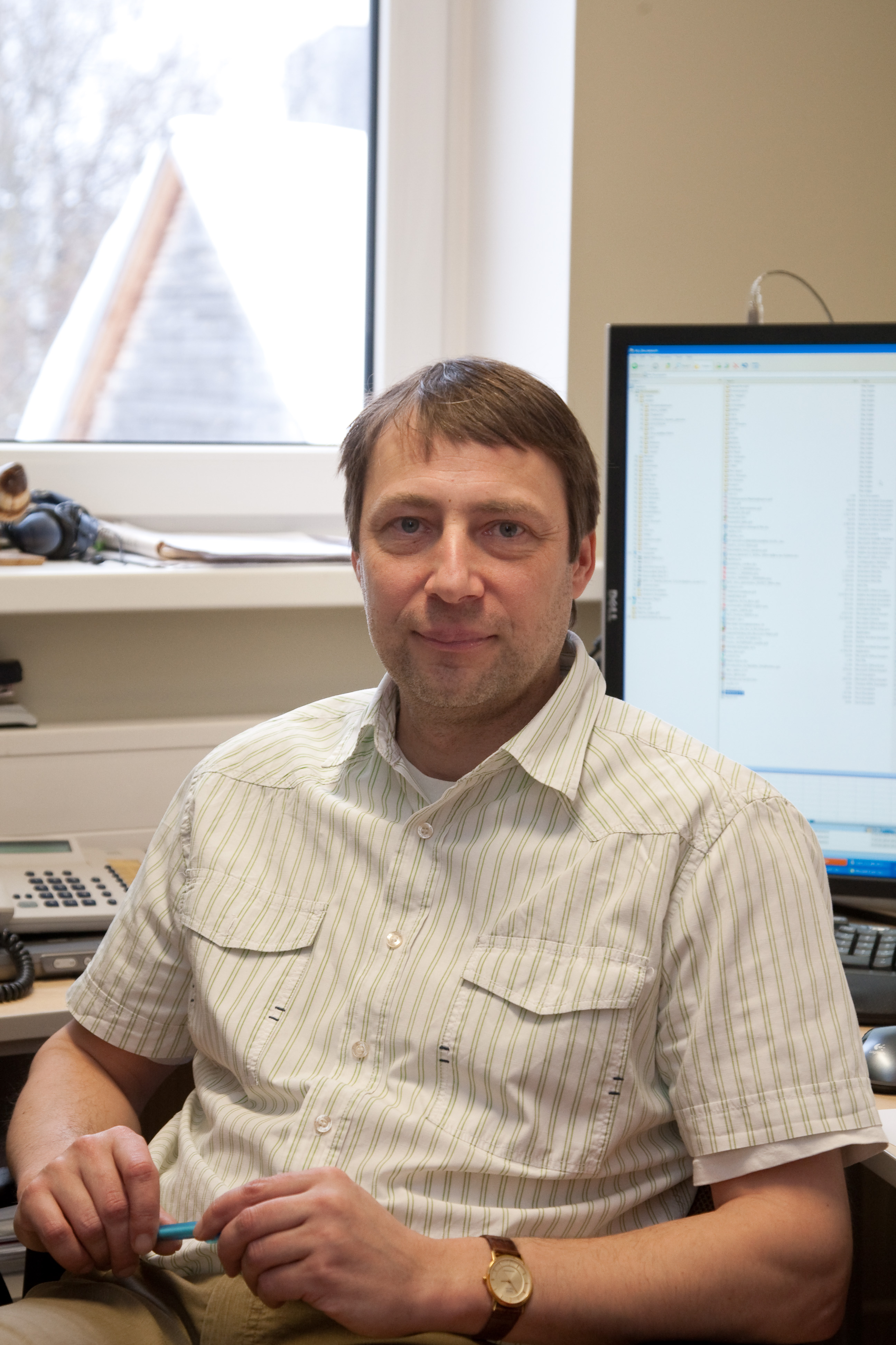 Tartu Ülikooli Molekulaar- ja Rakubioloogia Instituudi bioinformaatika õppetooli juhataja professor Maido Remm.